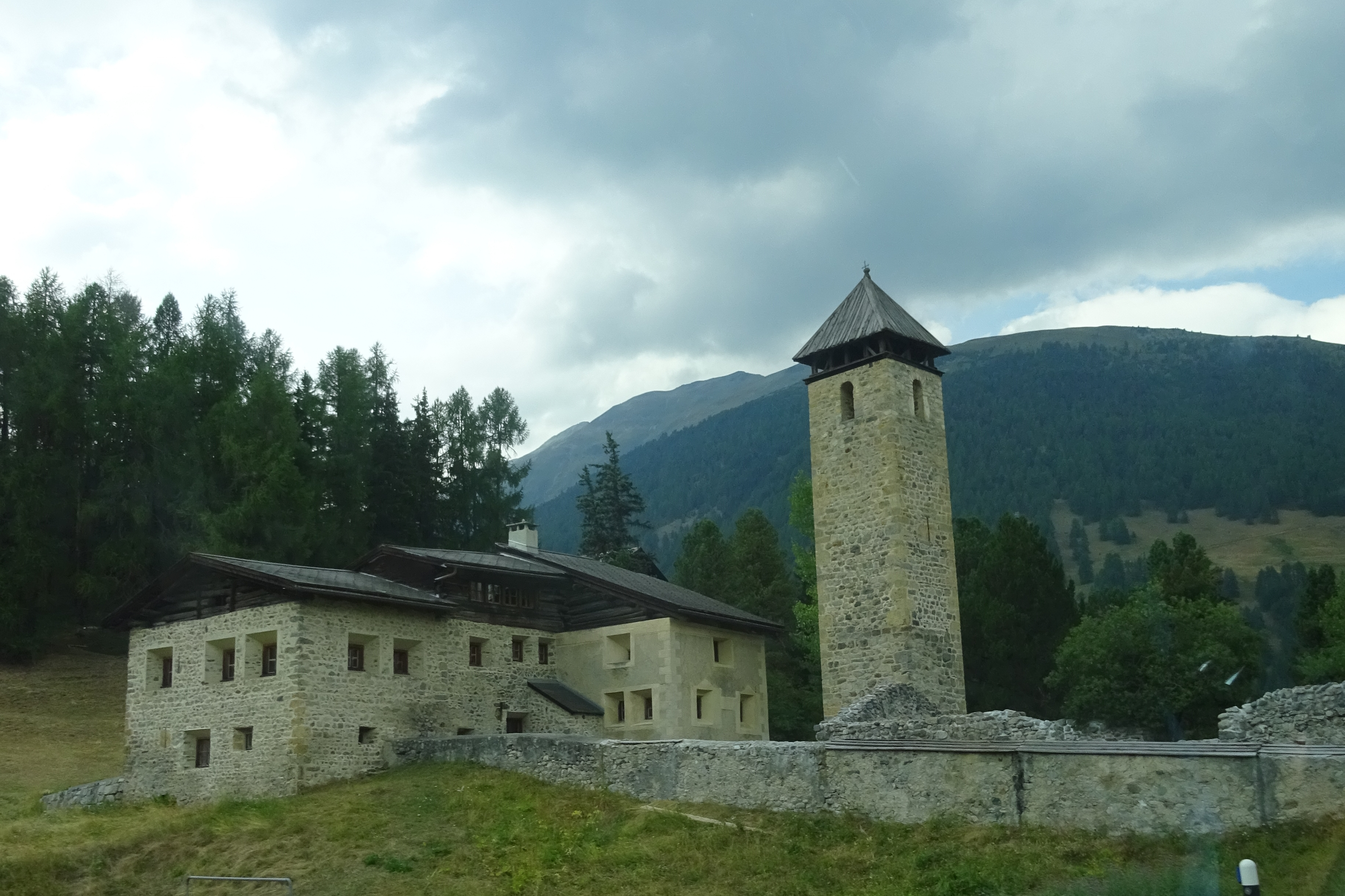 La Chapella, S-chanf, agosto 2015